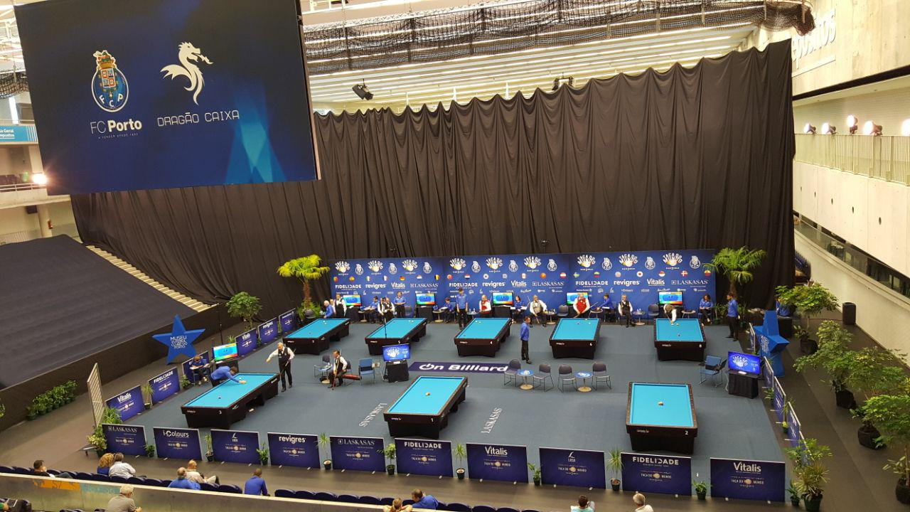 Turniersaal im Pavilhão Dragão Caixa (FC Porto)